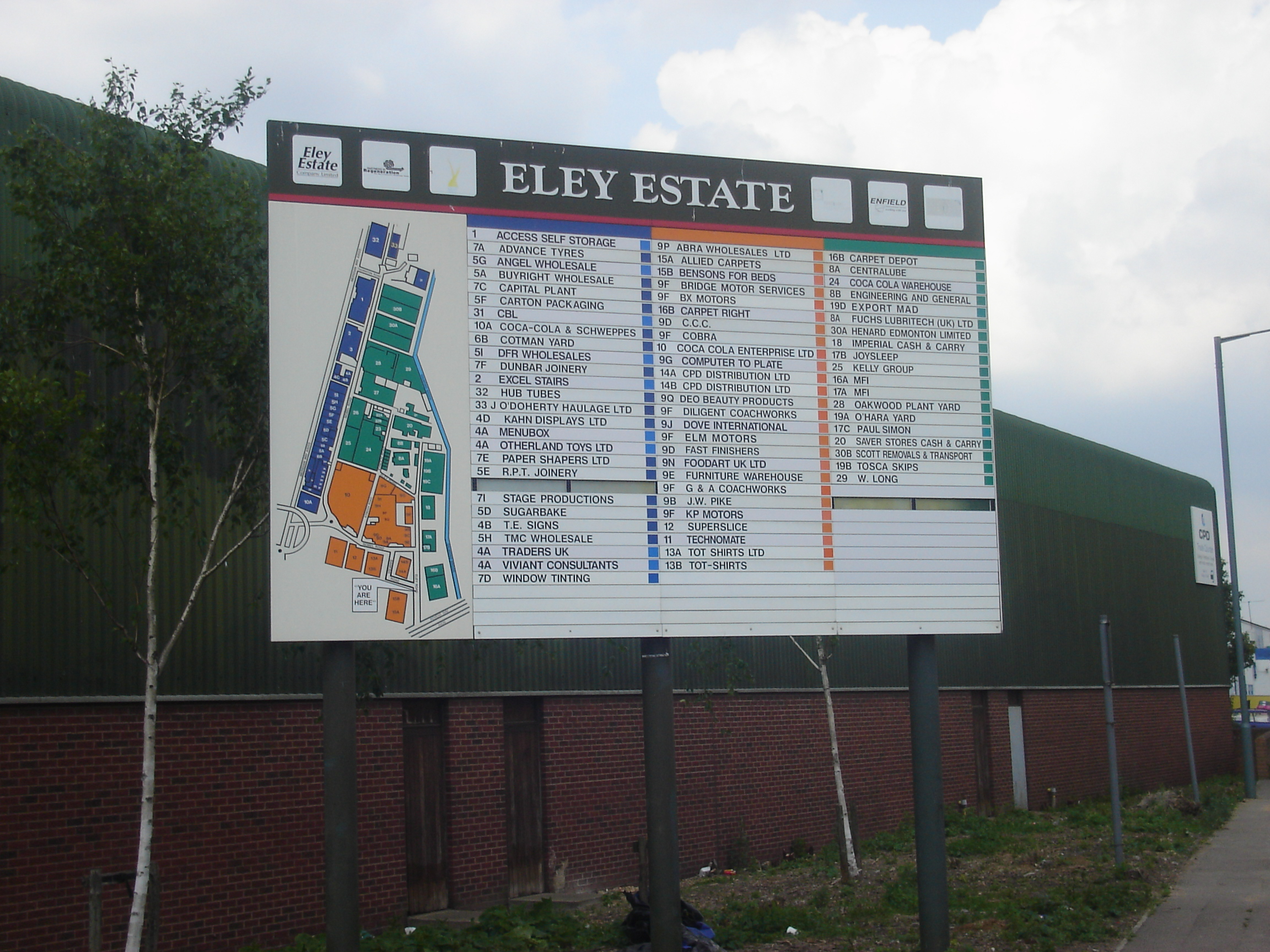 Eley Industrial Estate